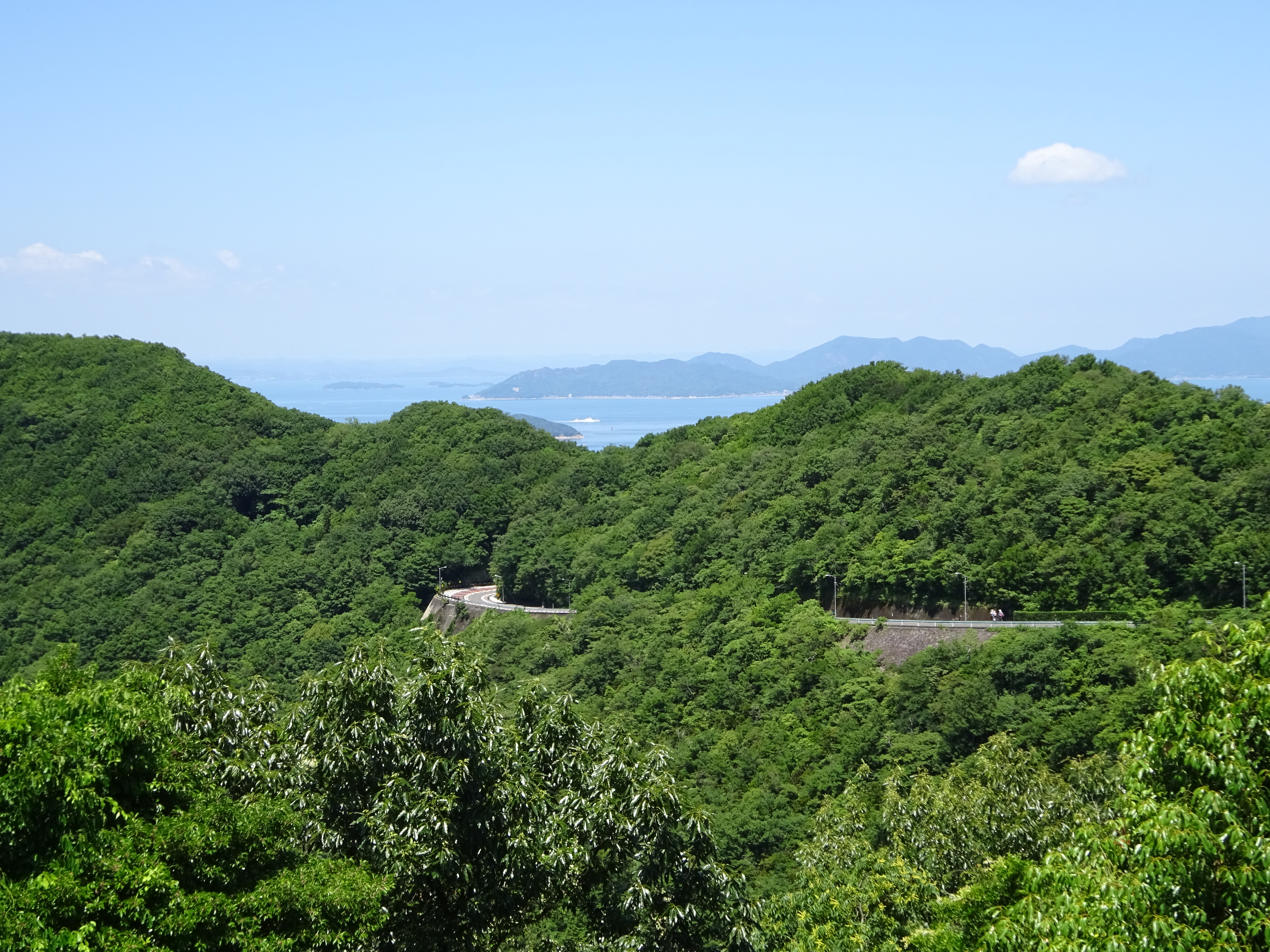 山上で屋島スカイウェイの西斜面を望む。2018年6月。